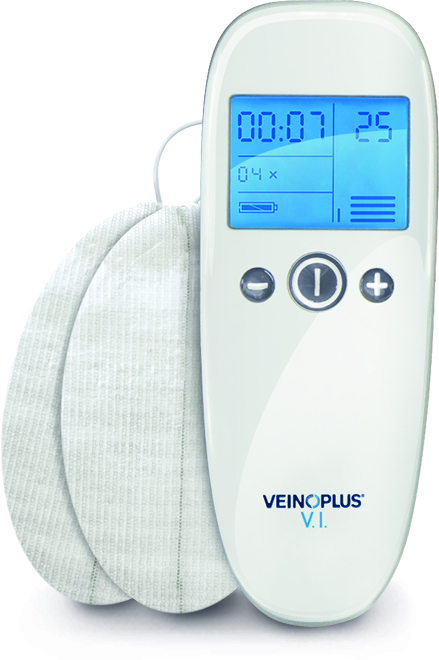 test adrem